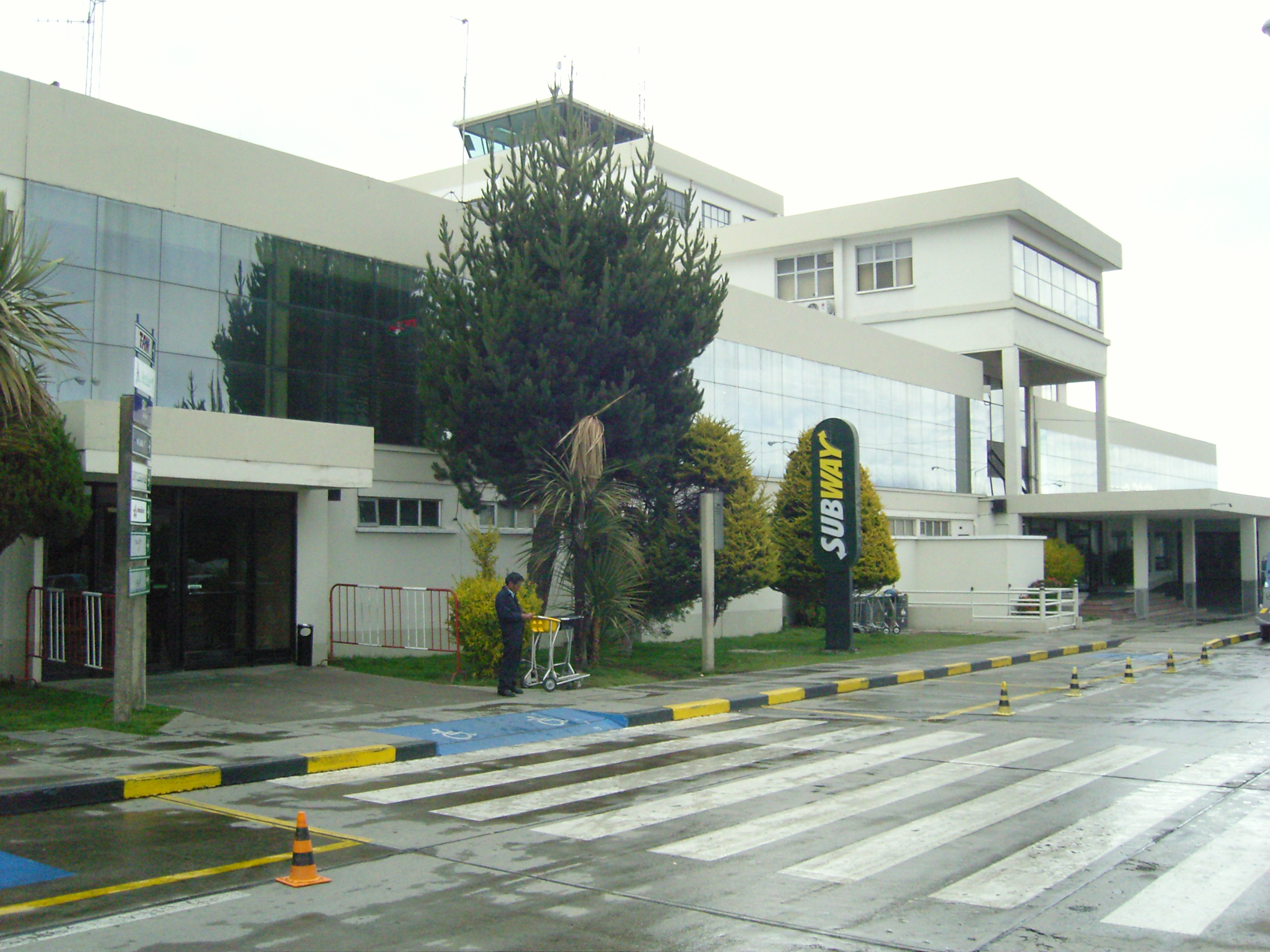 Aeropuerto Internacional de la ciudad de El Alto, La Paz - Bolivia